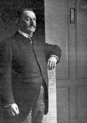 Eugène Ruffy (1854–1919) Politiker, Rechtsanwalt und Direktor des Weltpostvereins.